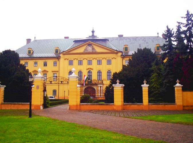 Kalocsa érseki palota